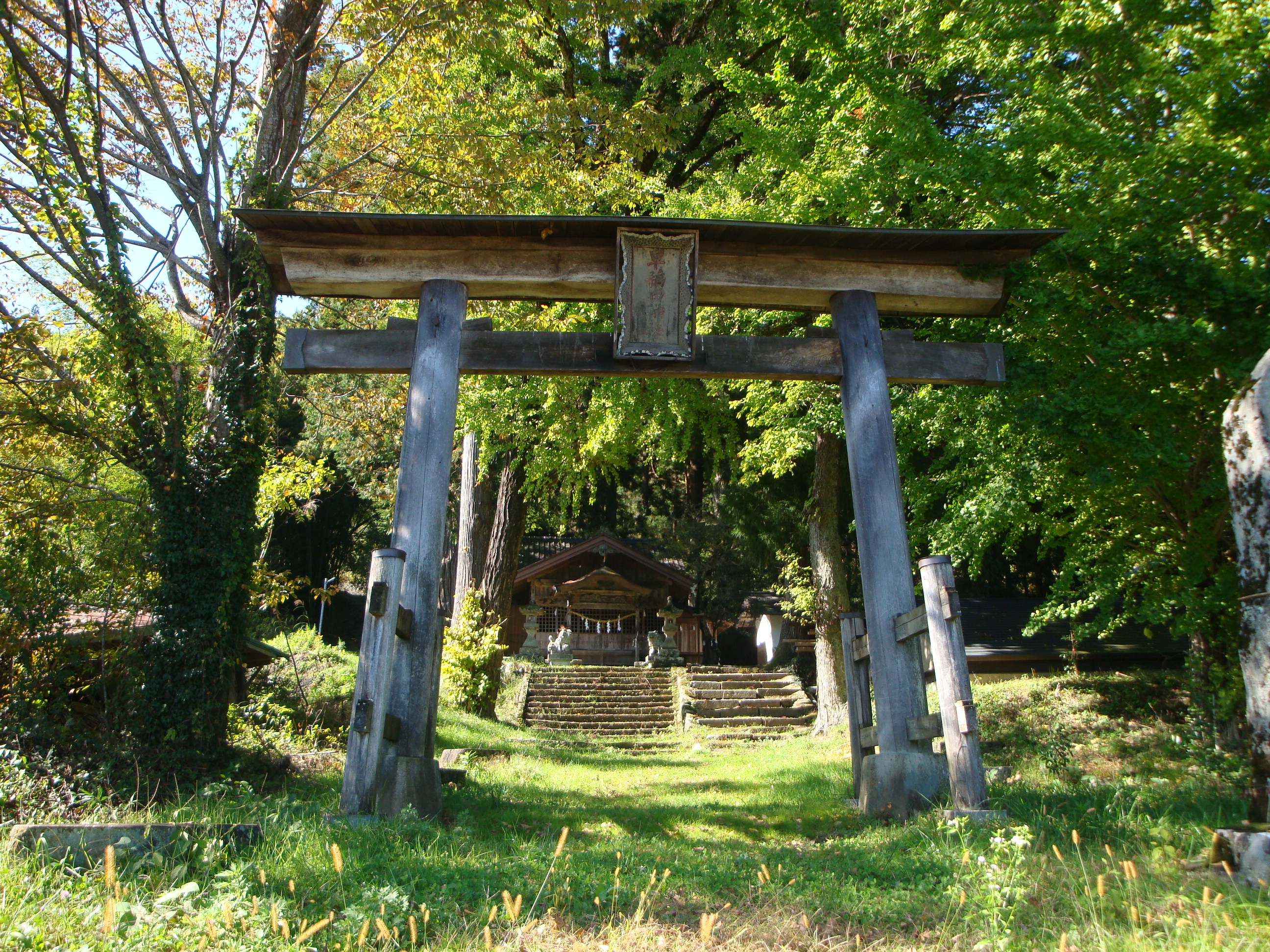 早稲田神社 鳥居 長野県阿南町